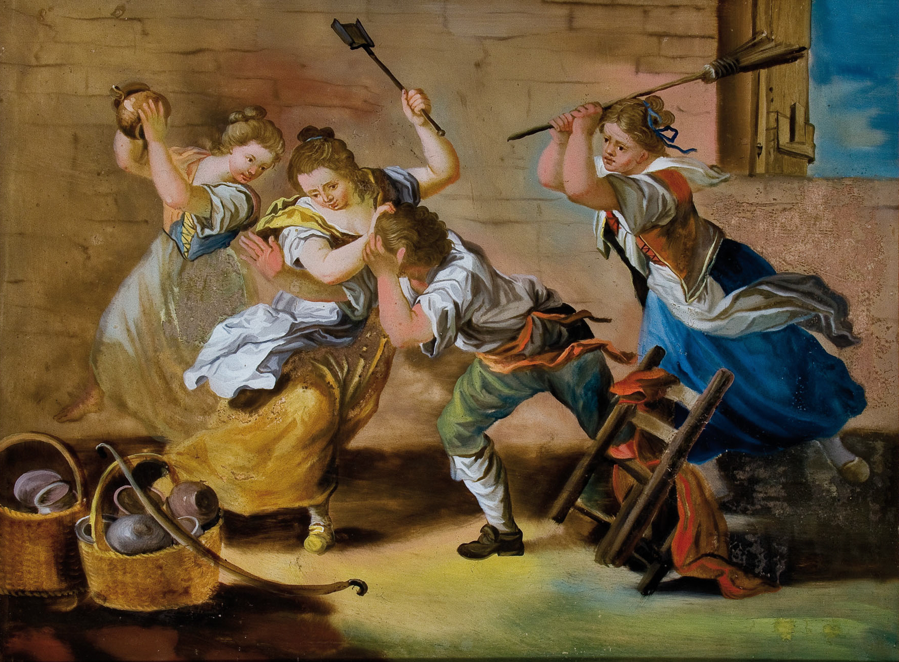 Prügelszene (ein Knecht wird von drei Mägden verprügelt), Hinterglasbild, 39 x 48 cm; Augsburg, Ende 18./Anfang 19. Jh.